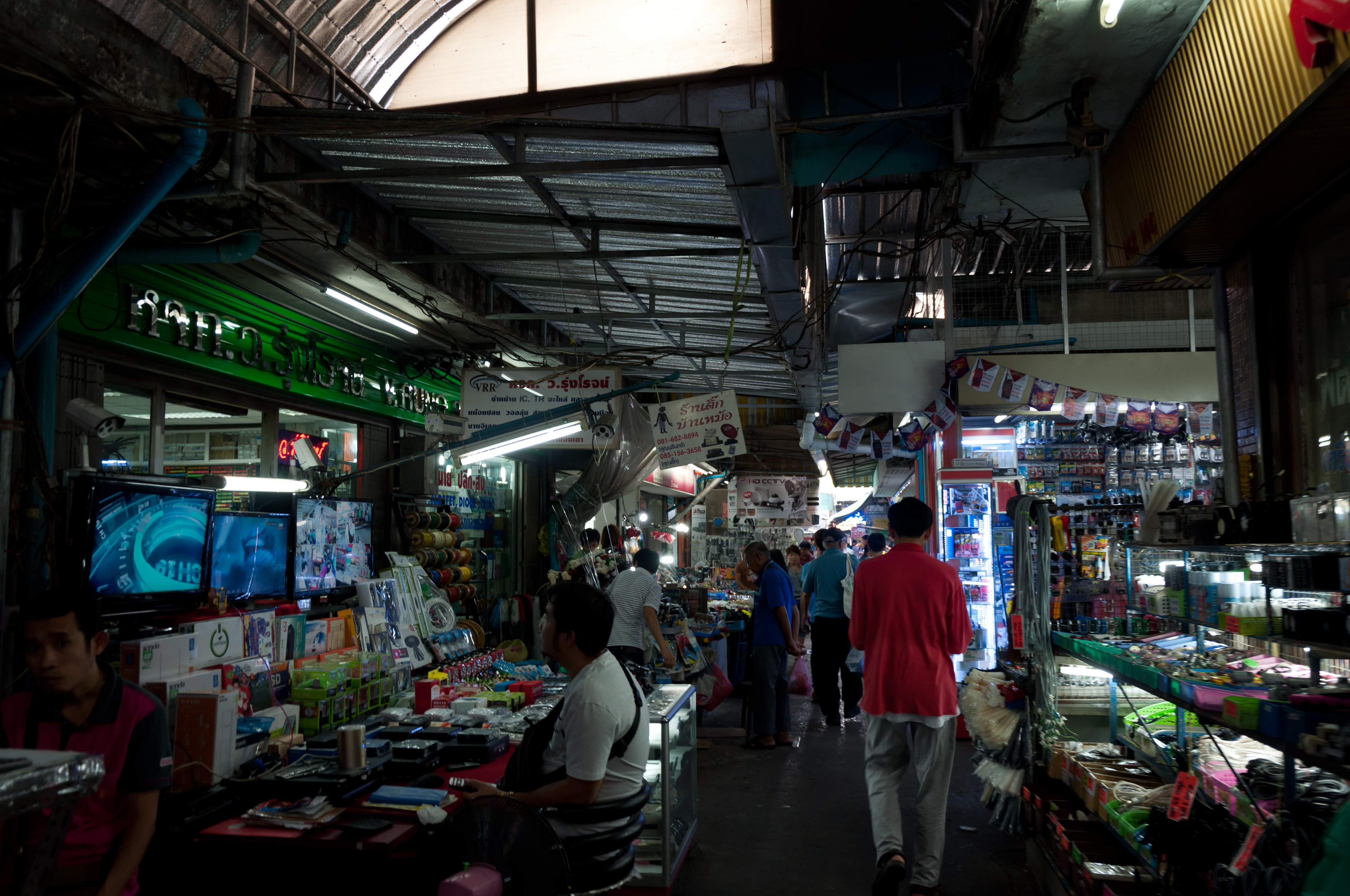 Wang Burapha Phirom, Phra Nakhon, Bangkok, Thailand